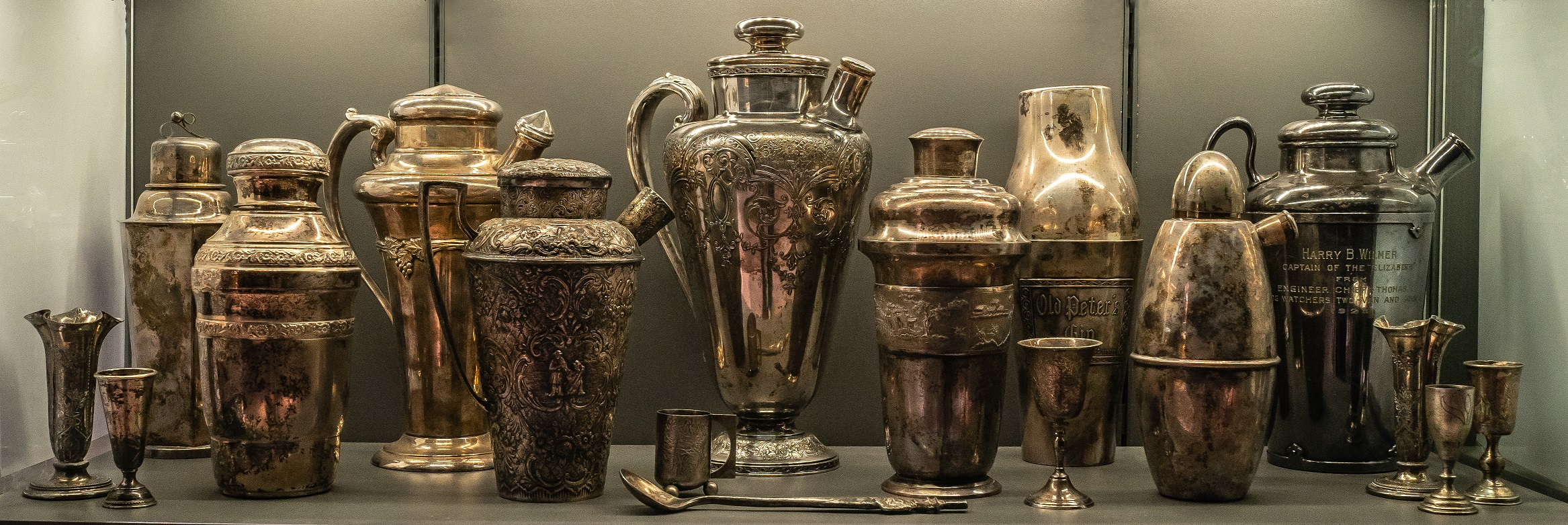 Obiekty w Muzeum Wódki